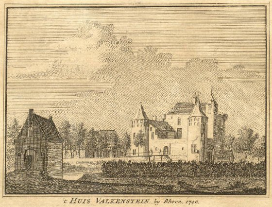 't Huis Valkenstein by Rhoon 1740 Slot Valckesteyn